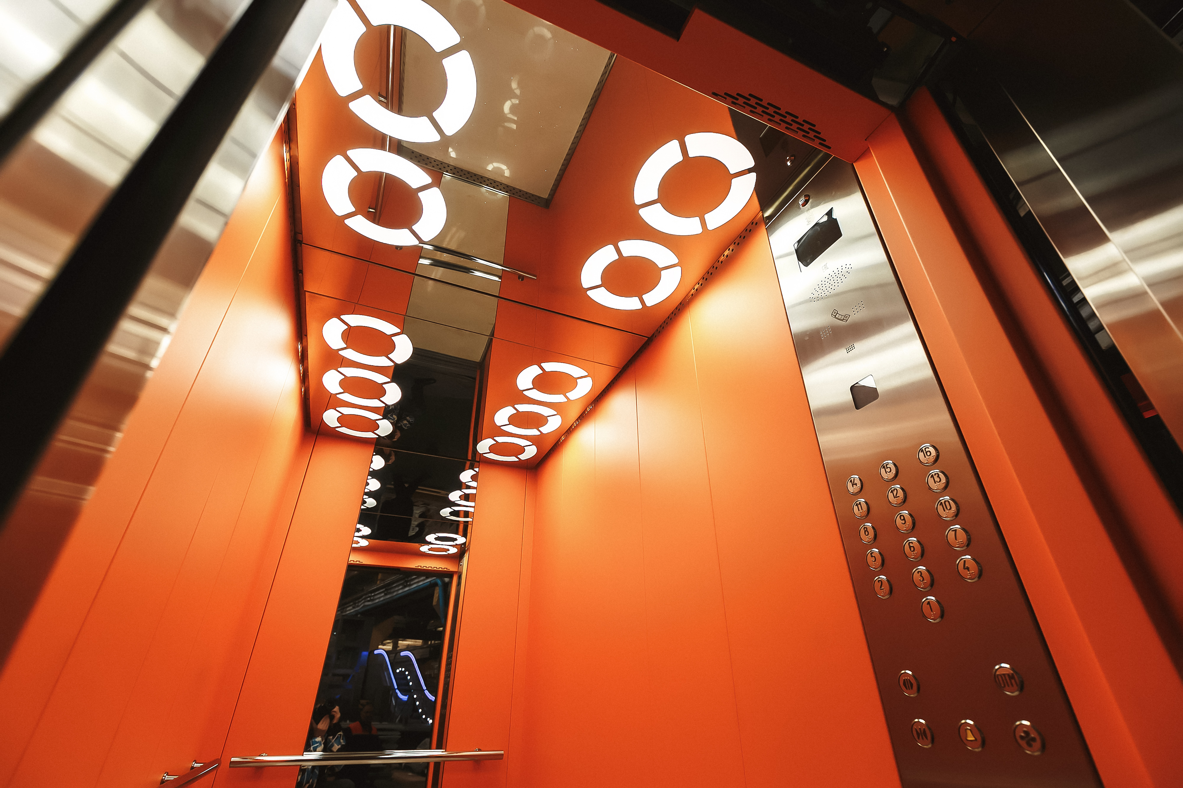 Вариант отделки пассажирского лифта, производства ОАО "Могилевлифтмаш" пасажырскі ліфт, вытворчасці ААТ "Магілёўліфтмаш"